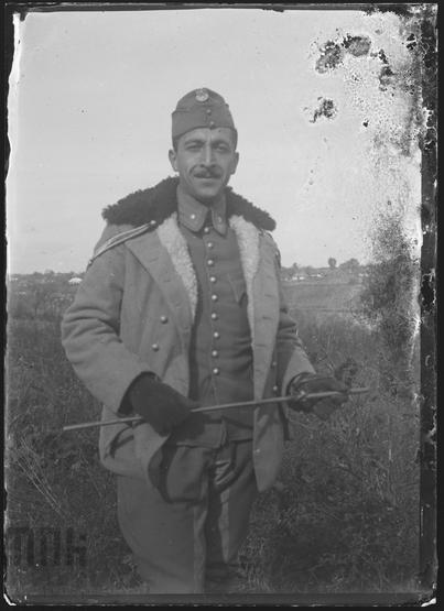 Na zdjęciu widzimy podporucznika Tadeusz Grabowski w czasie służby w Legionach Polskich w oddziałach kawalerii. Po odzyskaniu przez Polskę niepodległości wstąpił do Wojska Polskiego. Uczestniczył w wojnie polsko-bolszewickiej, później dowodził m.in. 9 pułkiem strzelców konnych. Zamordowany w Charkowie w 1940 roku. Fotografia została wykonana na Wołyniu, najprawdopodobniej na wiosnę 1916 roku.